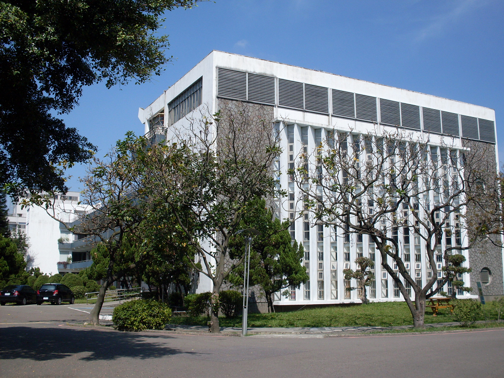 輔大法律學院